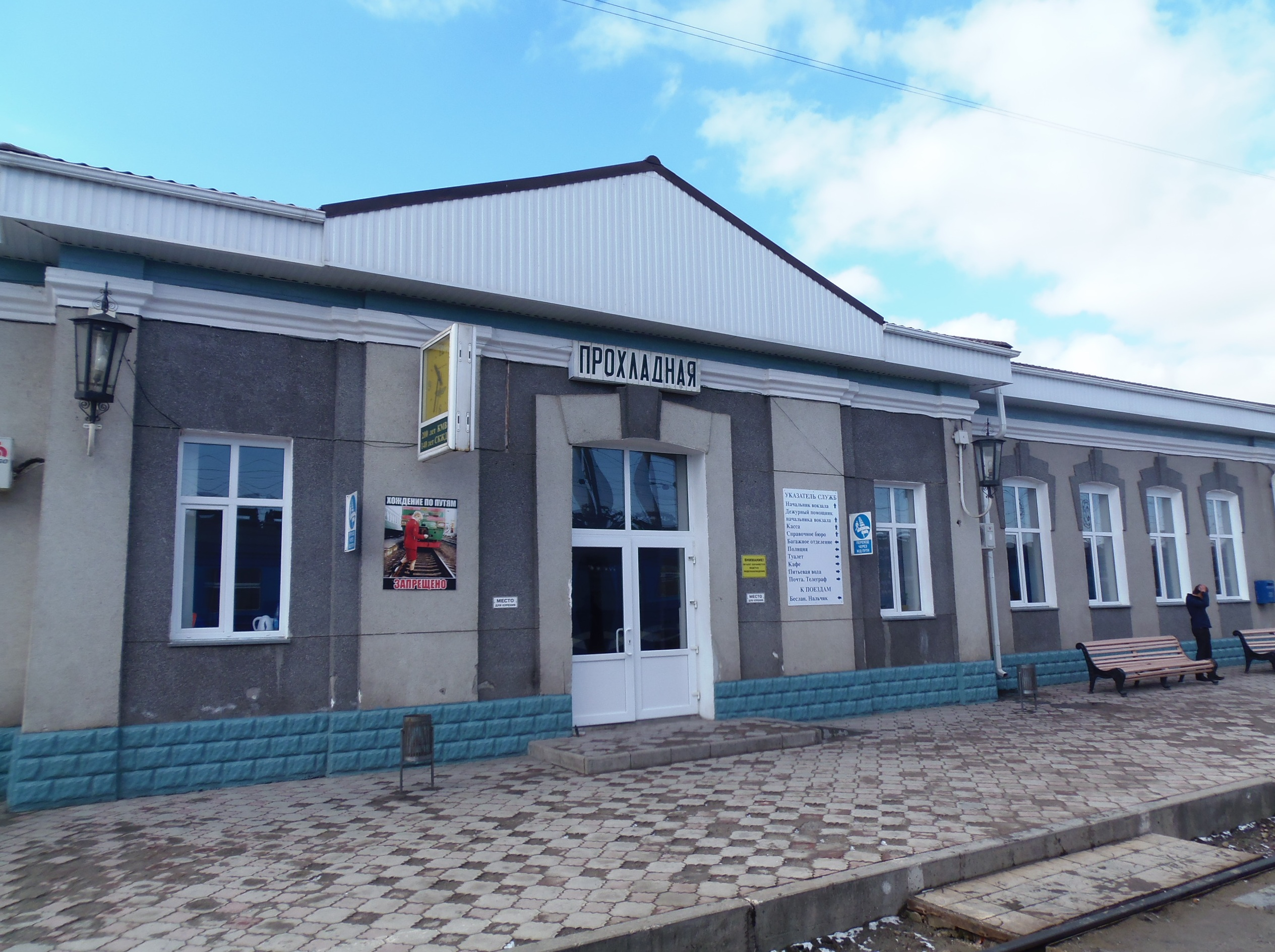 Железнодорожный вокзал станции Прохладная